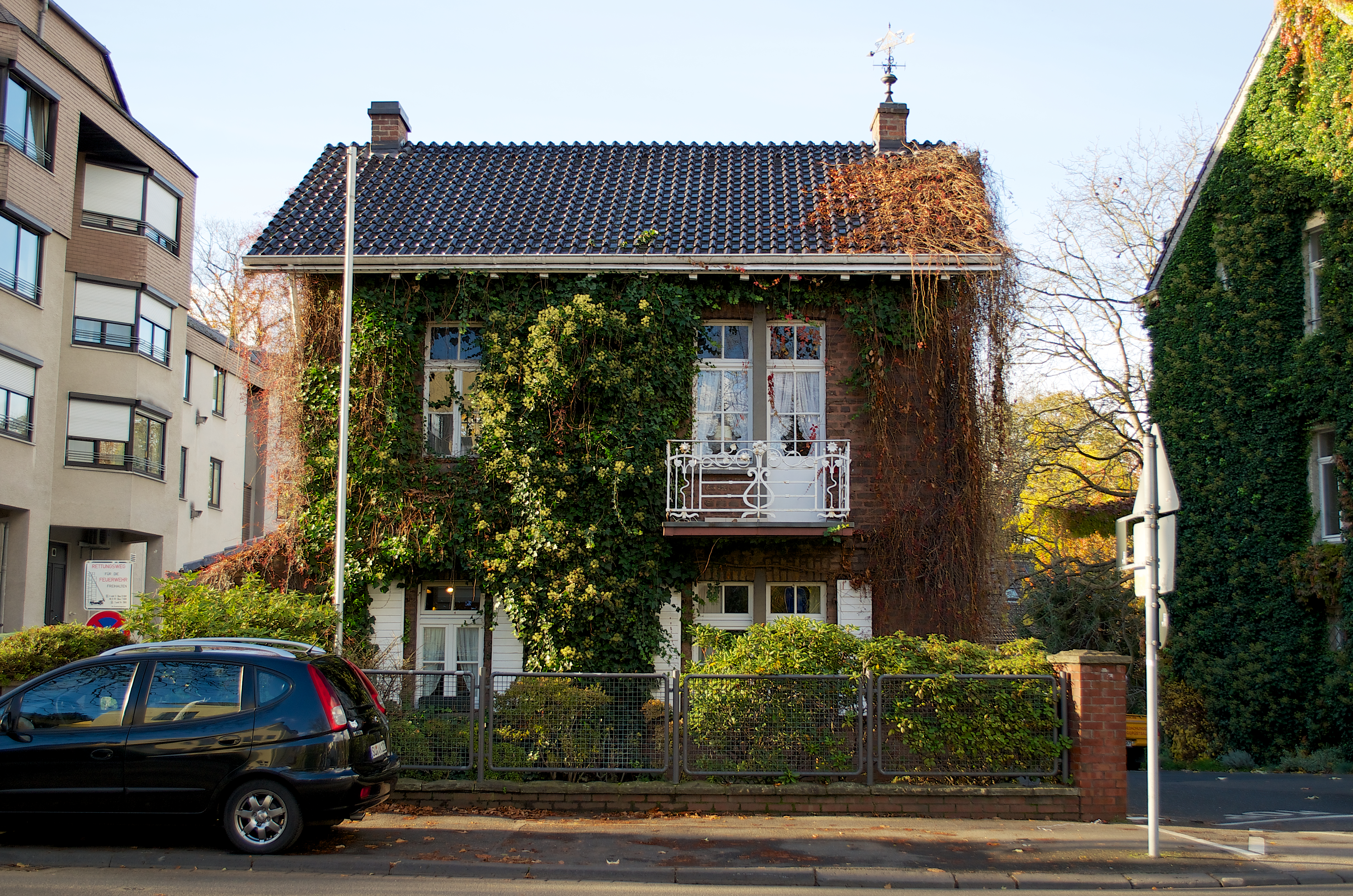 Denkmalgeschütztes Wohnhaus, Beethovenallee 33, Bad Godesberg (Ortsteil Godesberg-Villenviertel)